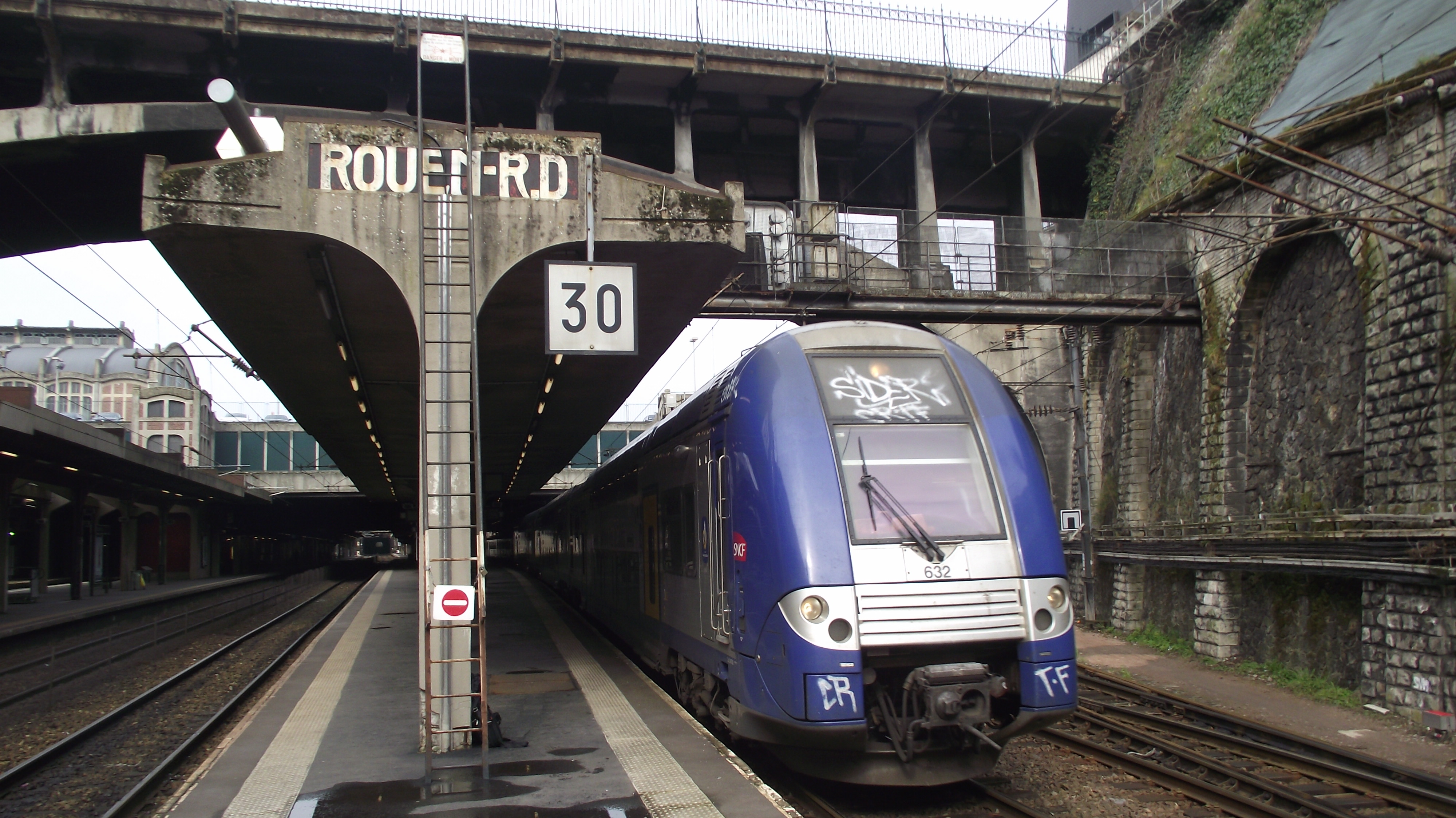 TER Haute Normandie trein naar Parijs.